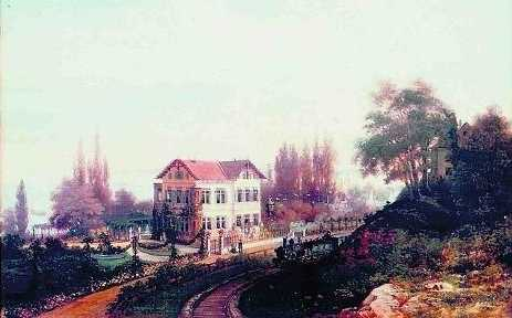 Villa Neuseeland von Georg Schöttle, Rorschacherberg, Gemälde von Pieter Franciscus Peters, 1865. 1889 an Franz Karl Kopp verkauft, 2008 abgerissen.